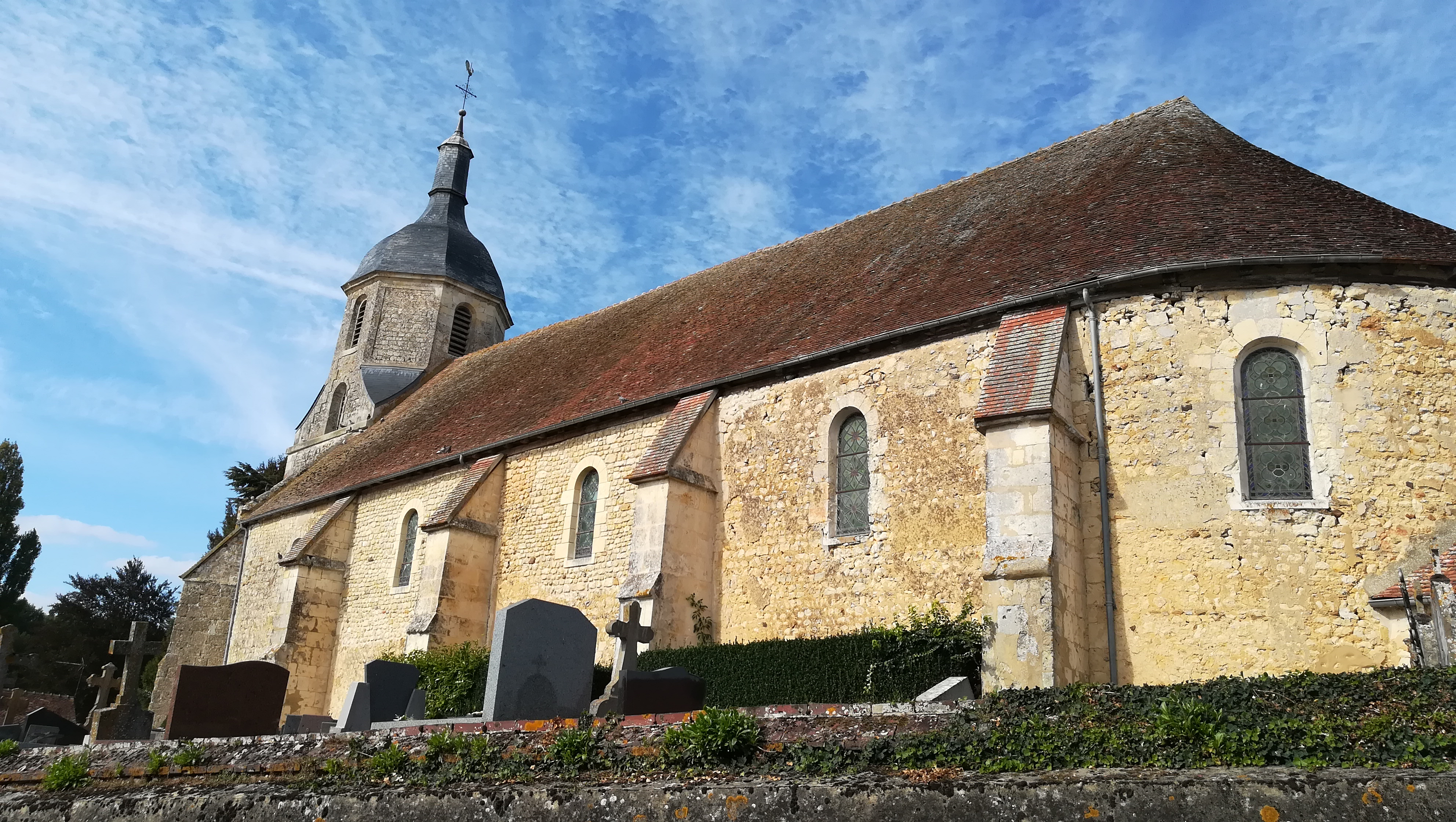 Église de La Mesnière